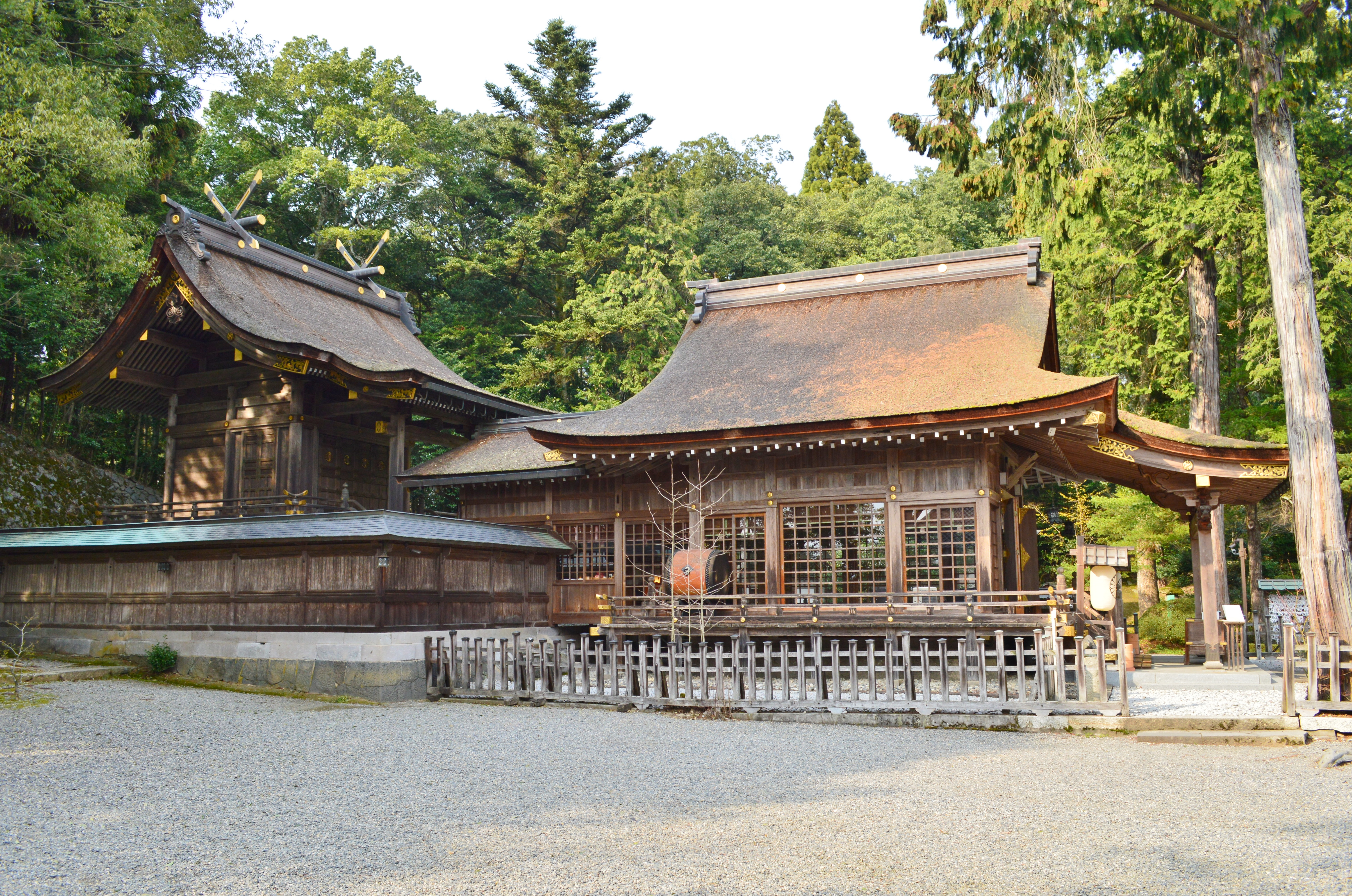 宇倍神社 社殿 Nikon D3200